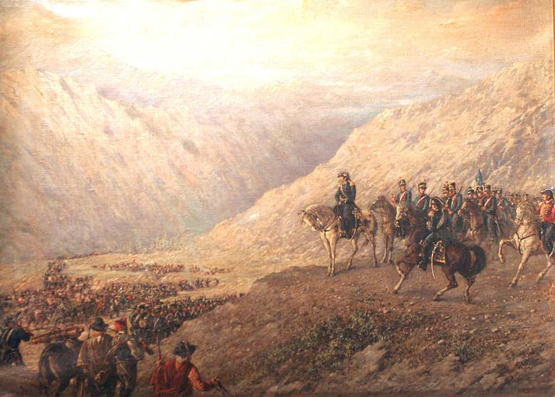 El paso de los Andes